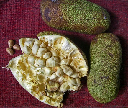 Artocarpus integer, fruit, from Muara Lawa, Kutai Barat, East Kalimantan, Indonesia